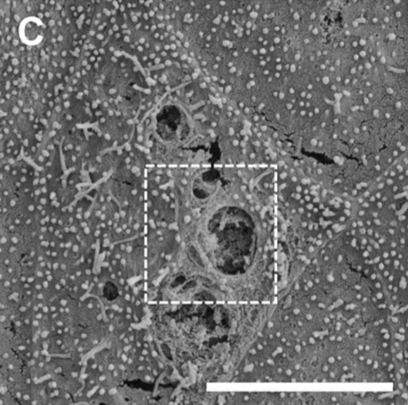 Fig 4. Visualización de la producción de moco y células caliciformes en la monocapa derivada de colonoides caninos. C) Una imagen SEM de bajo aumento de una célula caliciforme en la superficie celular apical de la monocapa derivada de colonoides caninos. Barra= 5 μm.